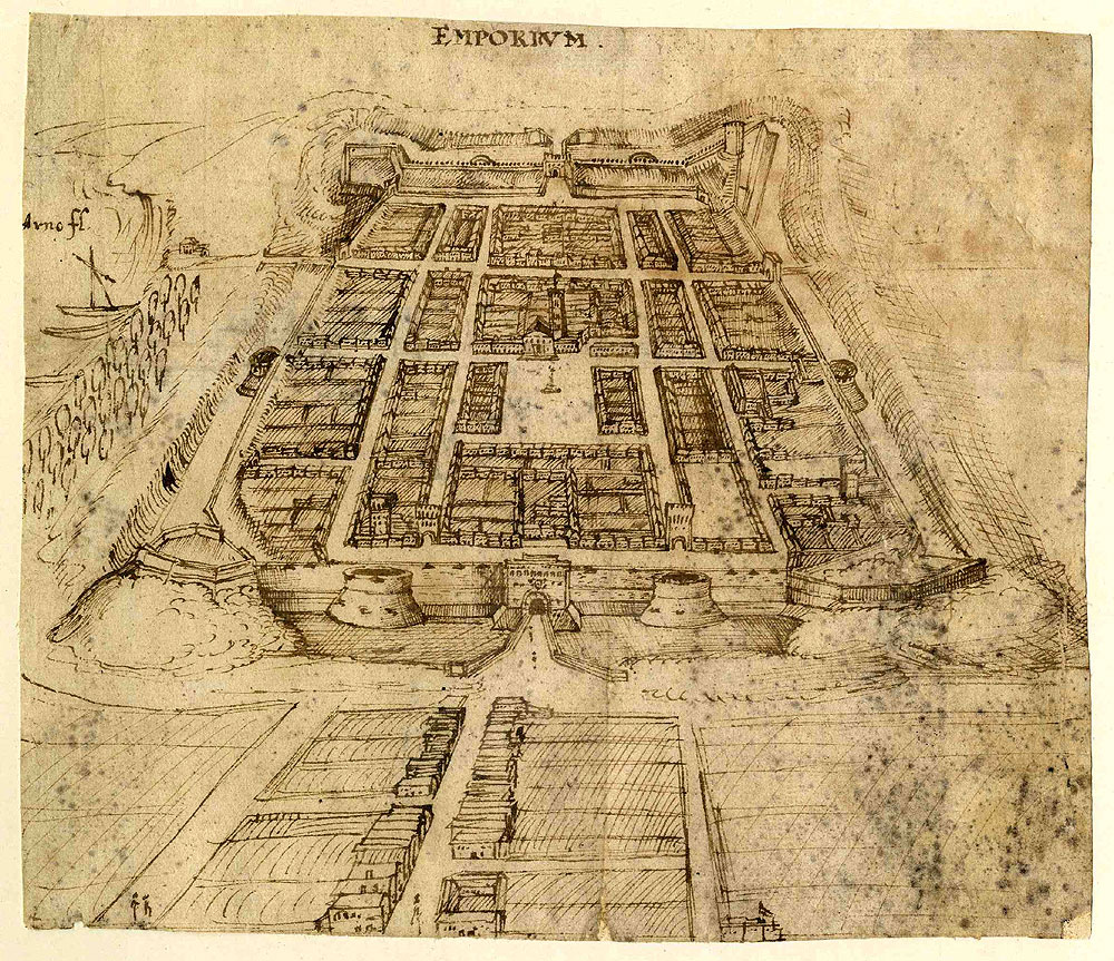 Emporium (Empoli am Arno, Federzeichnung, 16. Jahrhundert)